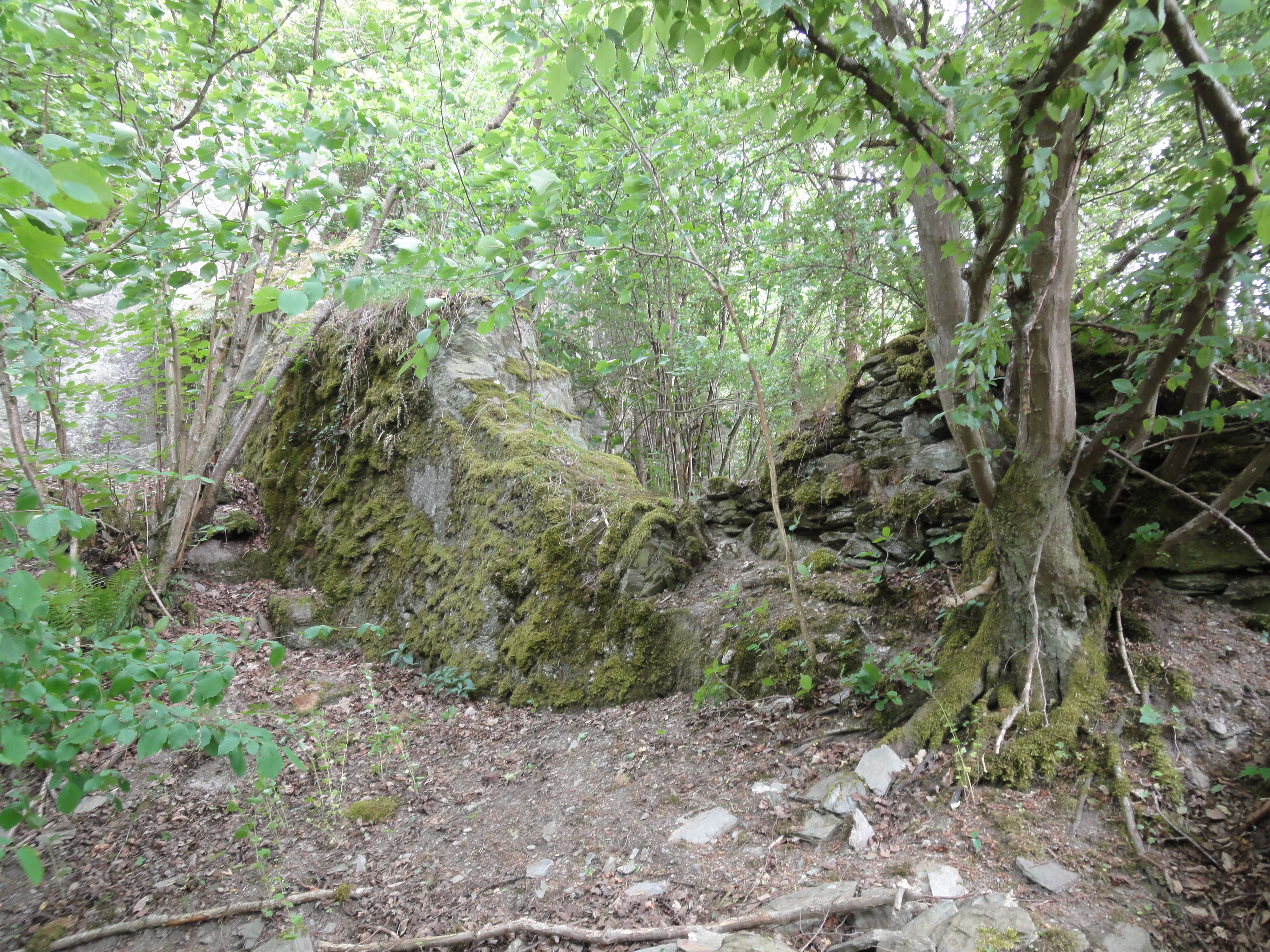 Burg Greifenstein bei Hohenstein - Mauerwerk integriert in Felsformationen